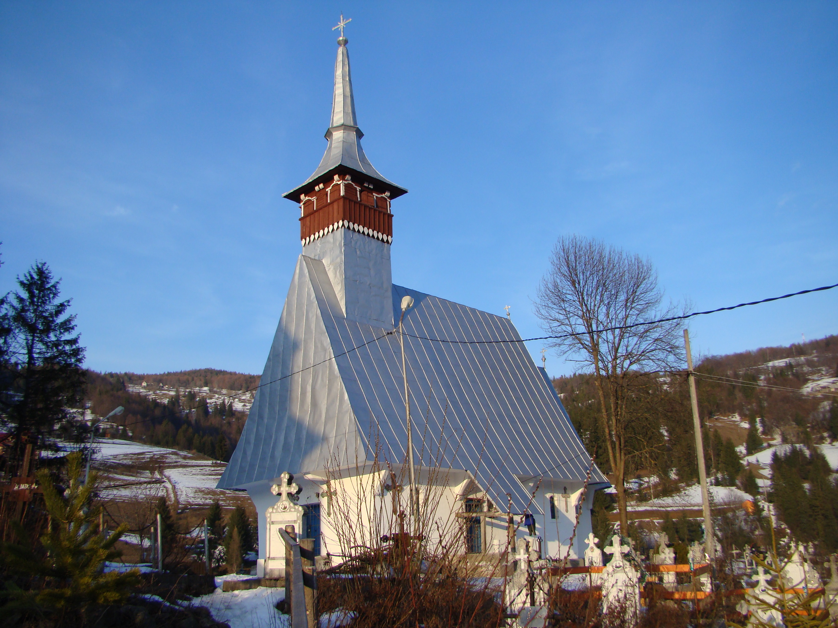 Biserica de lemn „Înălțarea Domnului” din Arieșeni, județul Alba